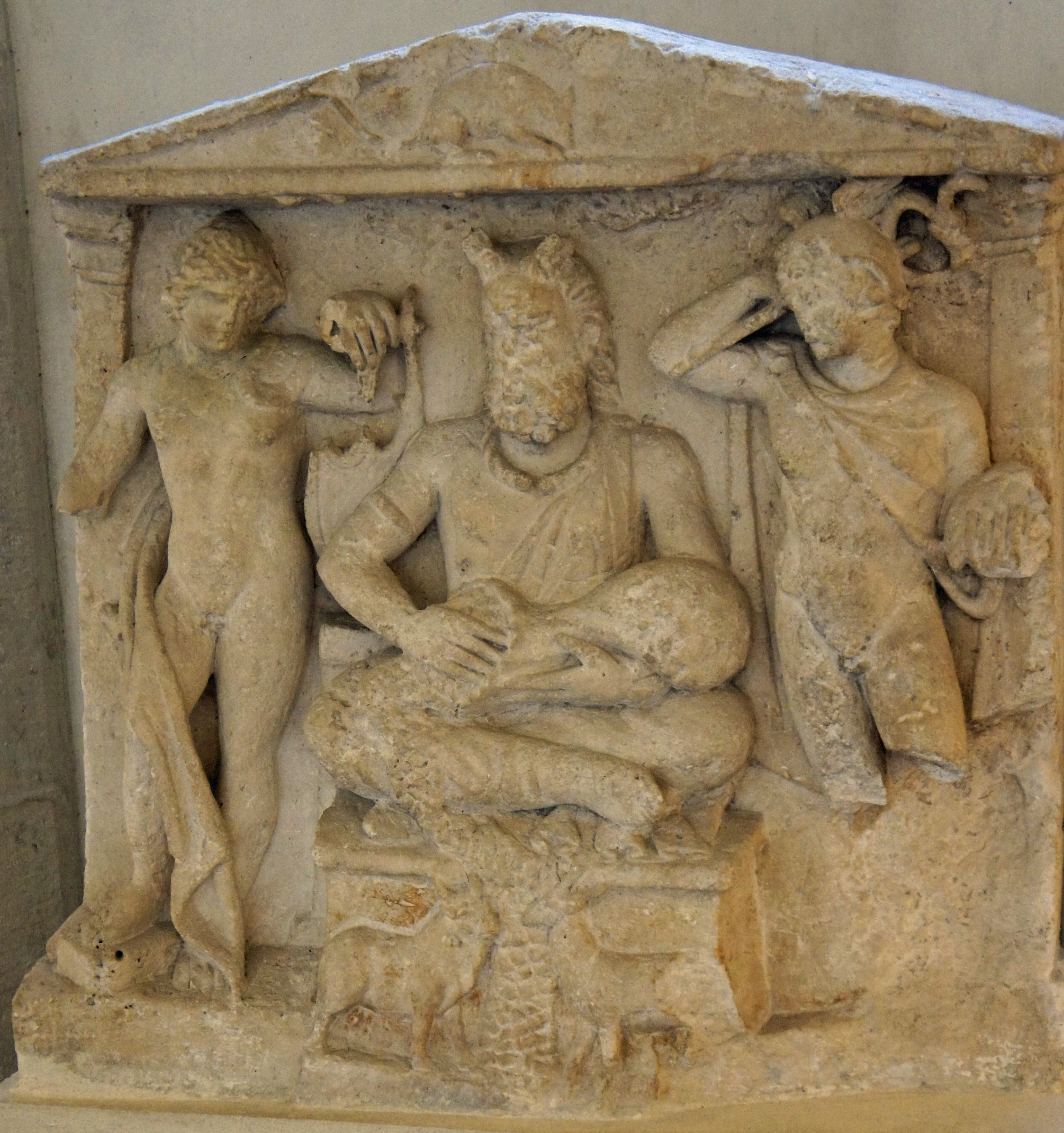 Dans la salle des antiquities romaines au Musée Saint-Remi, Apollon, Cernunos et Mercure.